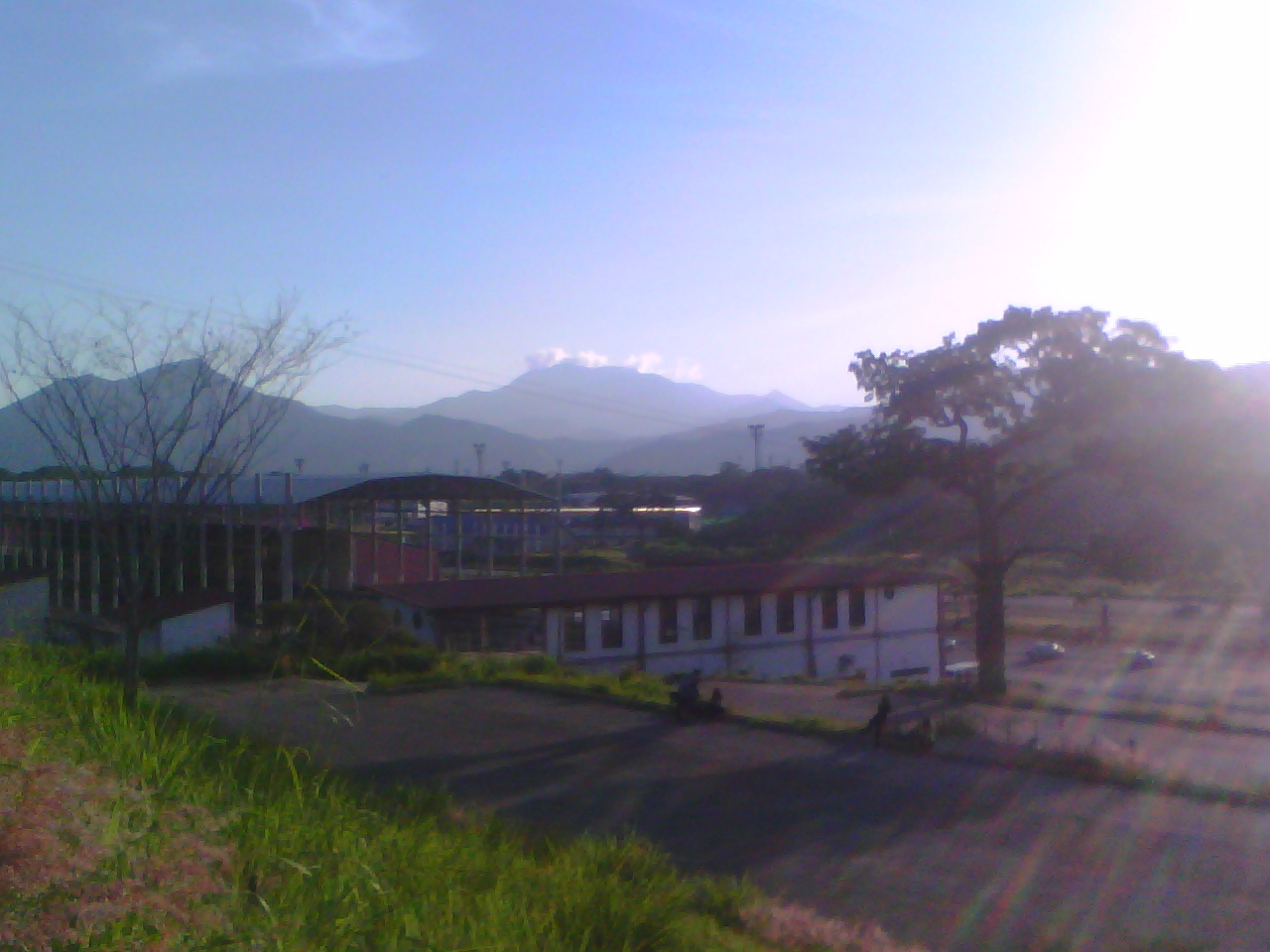 el pico platillón desde la villa olímpica